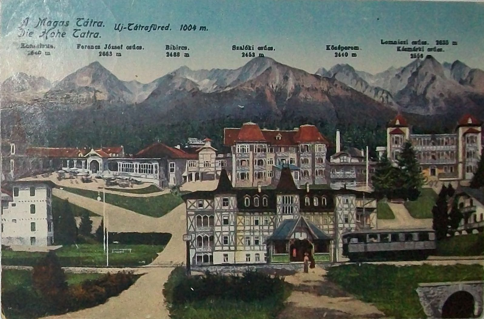 Pohľadnica Nového Smokovca z roku 1922.